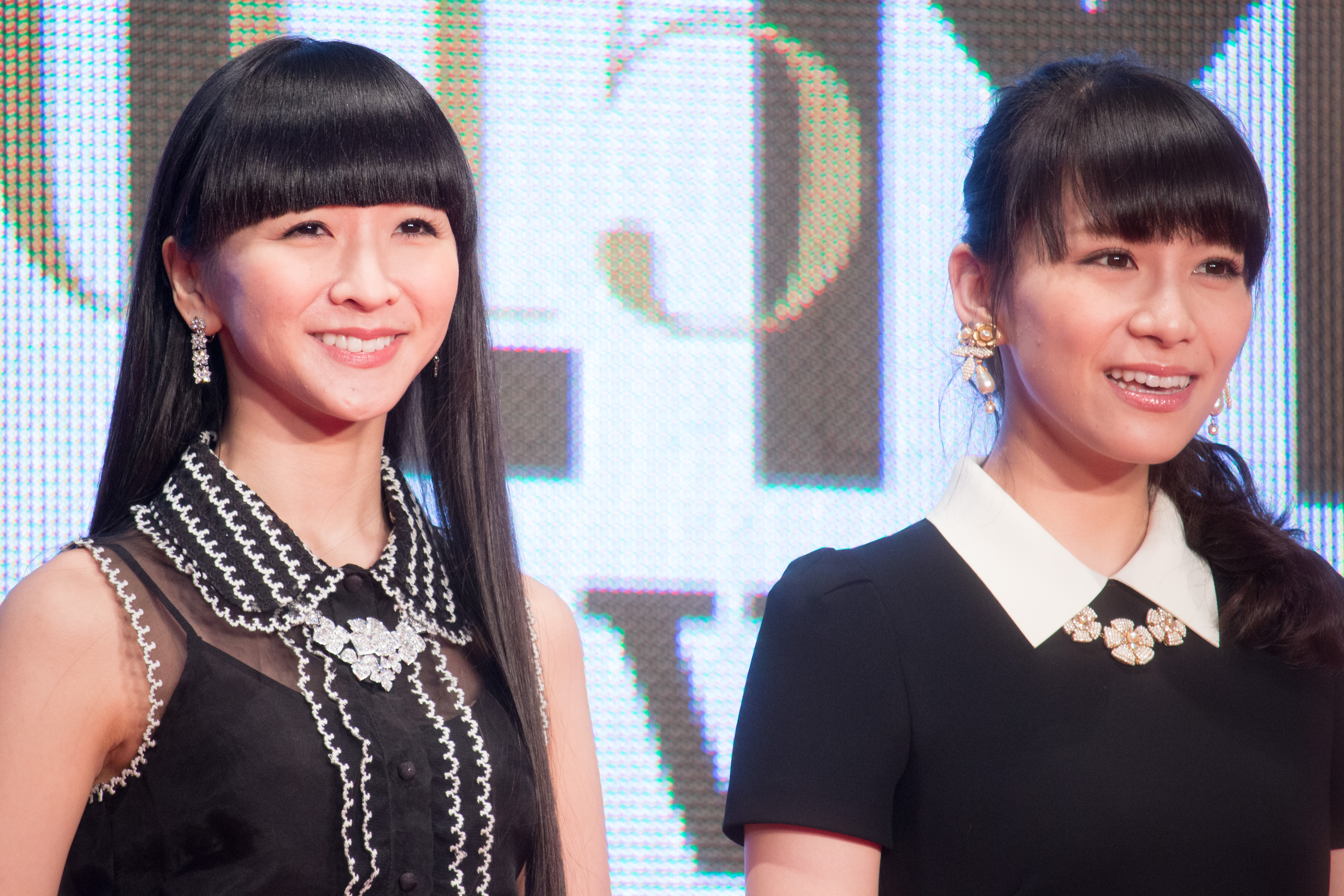 第28回 東京国際映画祭 オープニングセレモニー あ～ちゃん かしゆか (Perfume) (We Are Perfume)